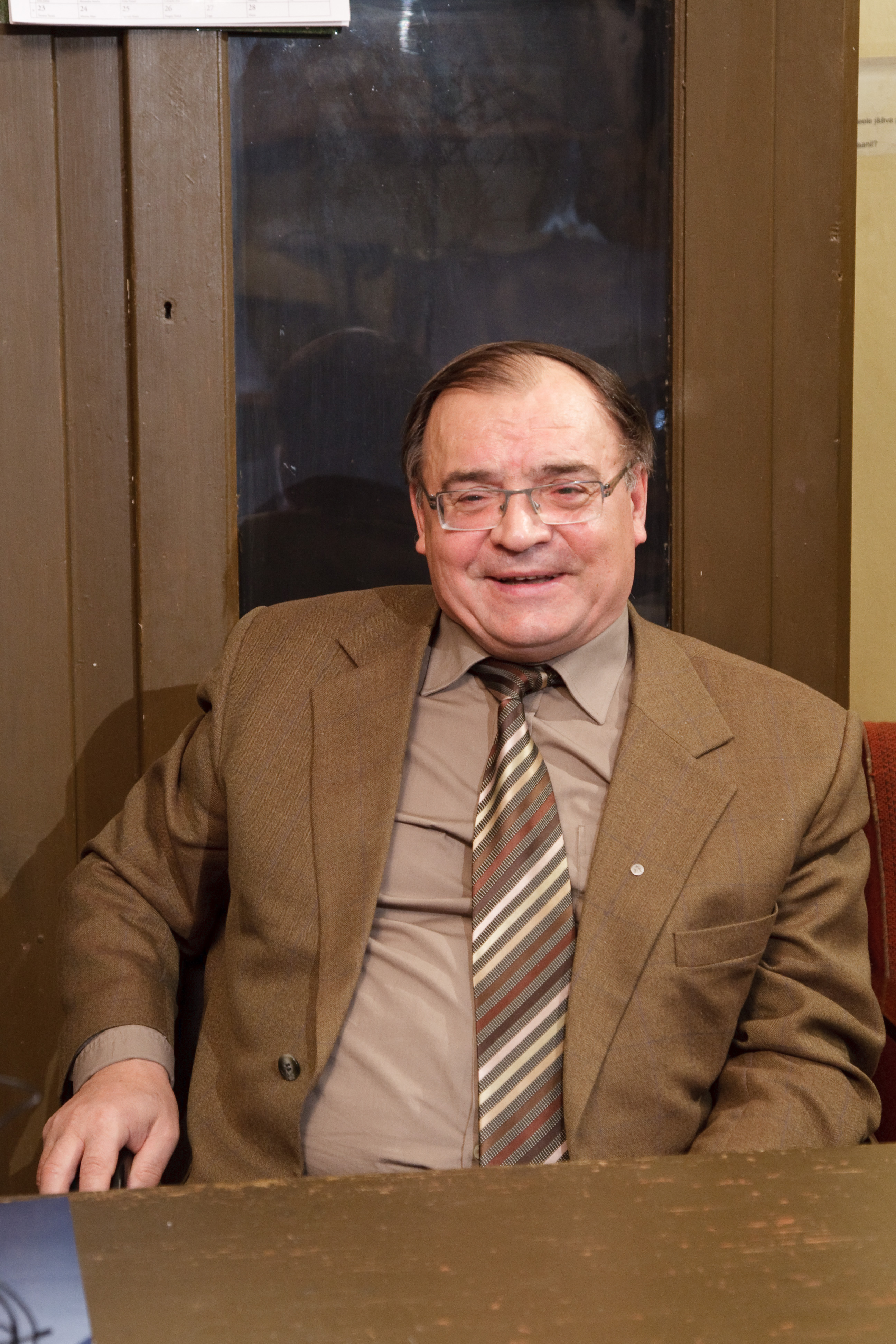 Akadeemik Vladimir Hižnjakov 2009. aastal Tartu tähetornis.